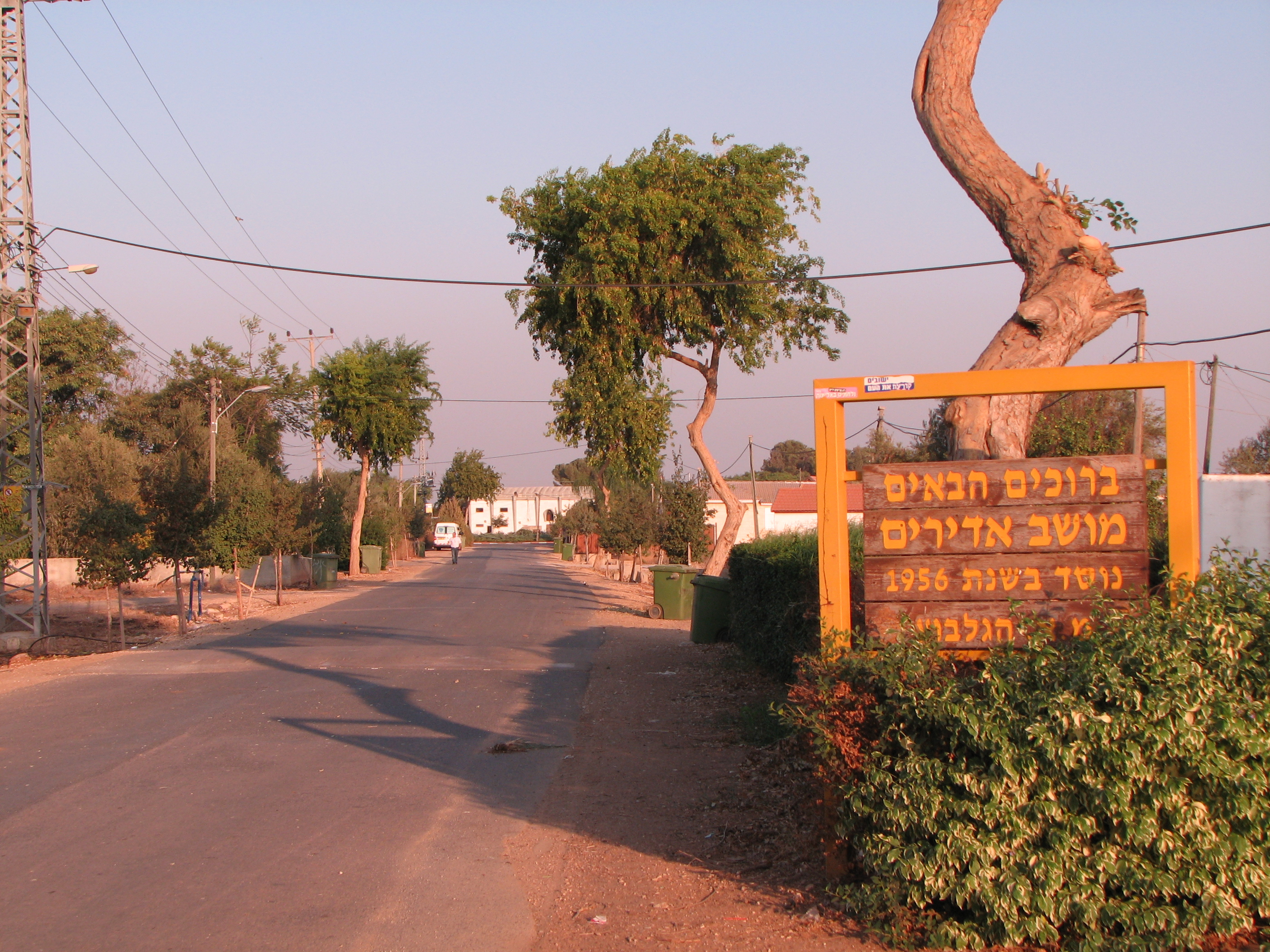 הכניסה למושב אדירים